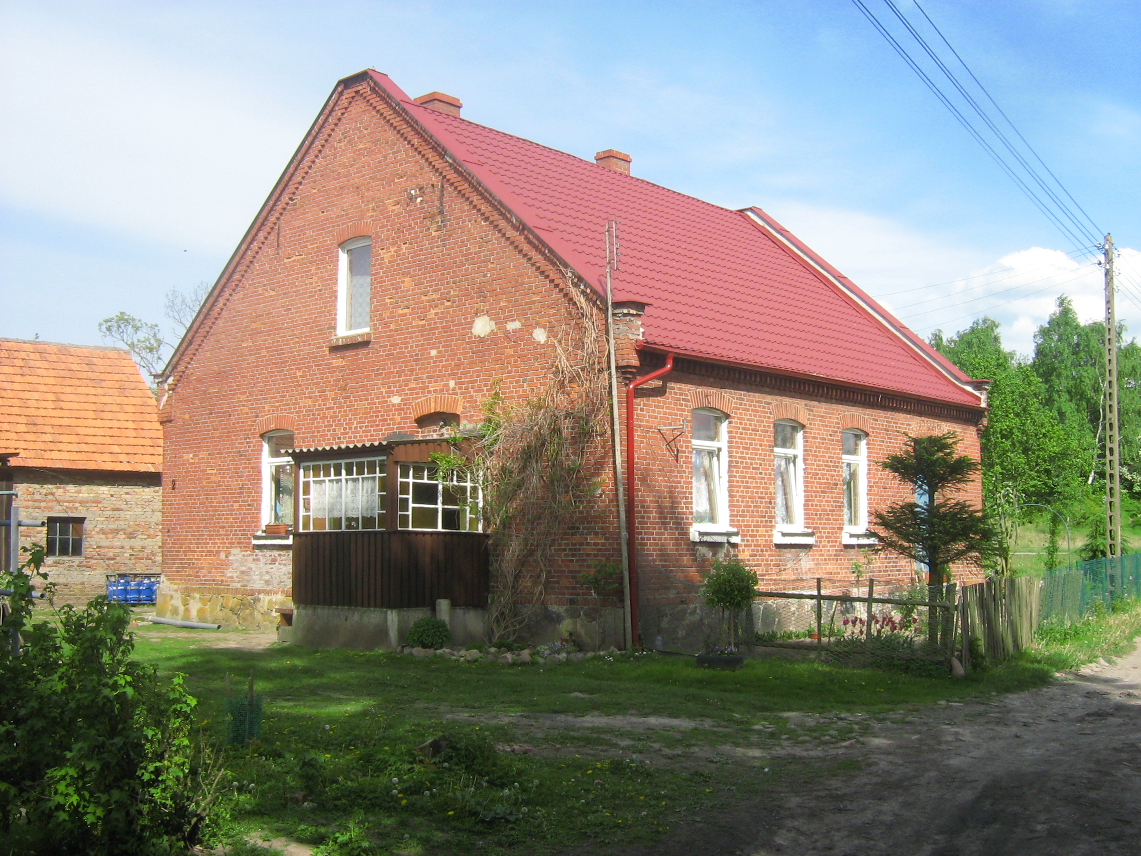 Zabytkowy dom w Lasce, o numerze "2".